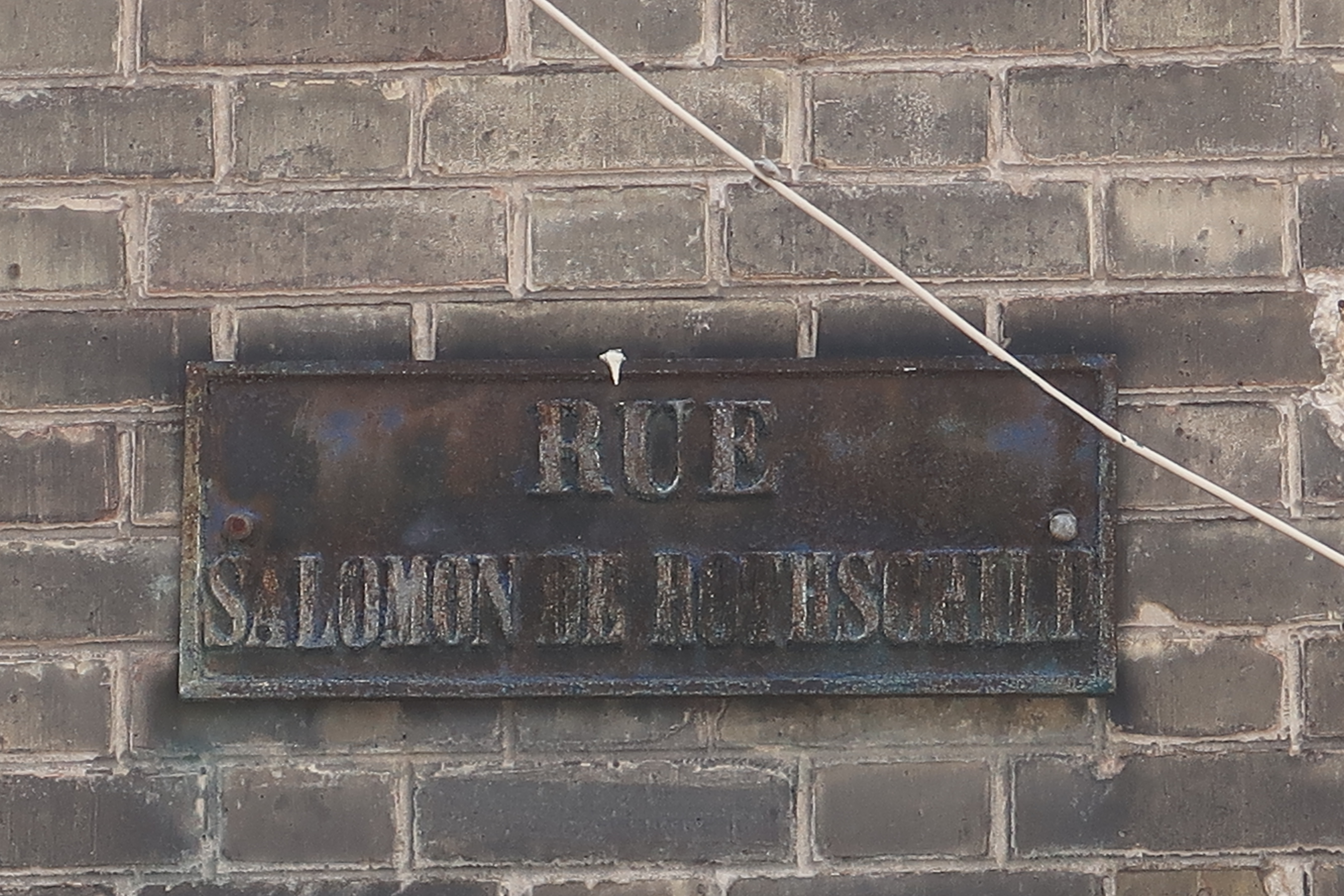 Plaque de la rue Salomon-de-Rothschild à Suresnes (Hauts-de-Seine).